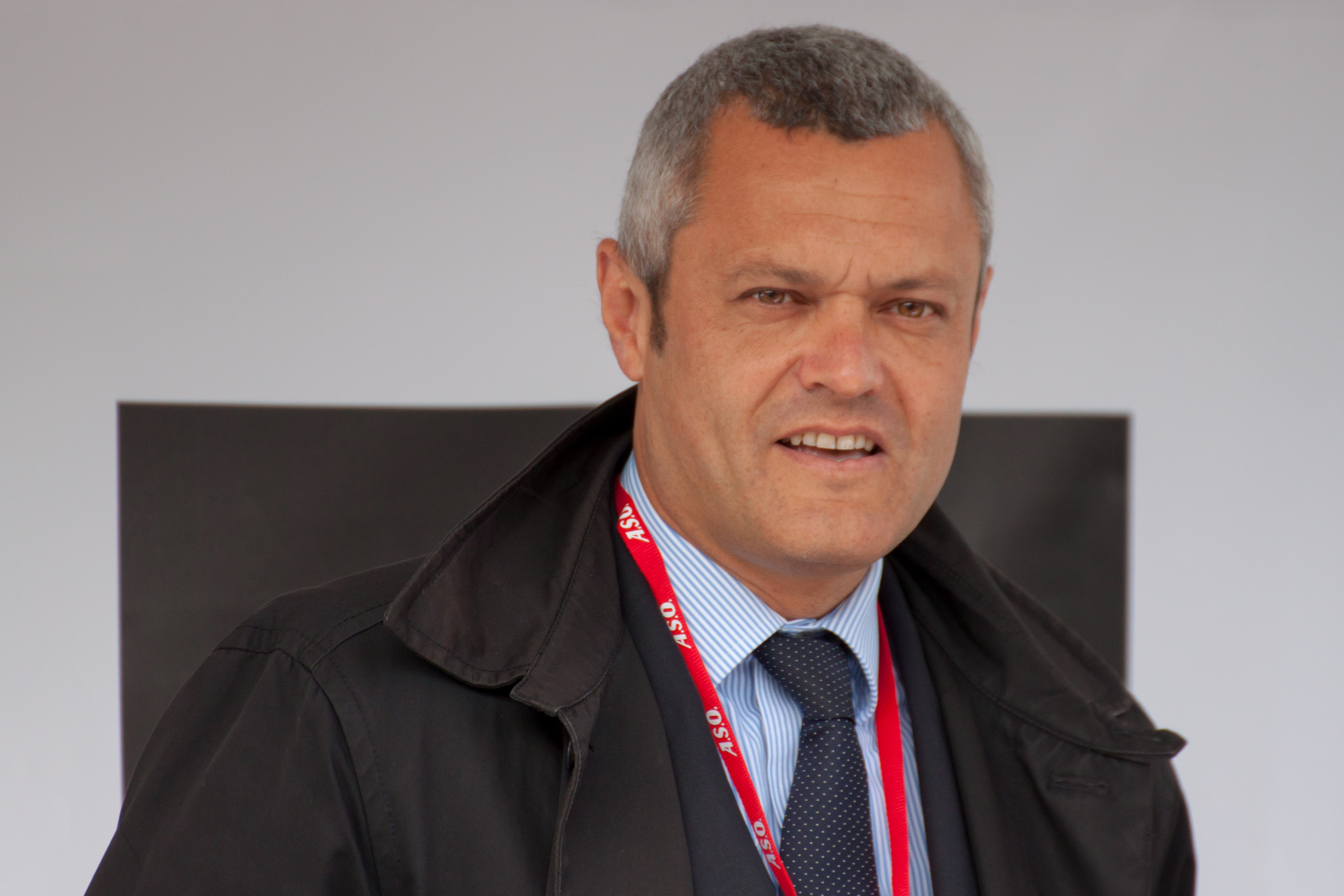 Fabrice Hugelé, maire de Seyssins (38)